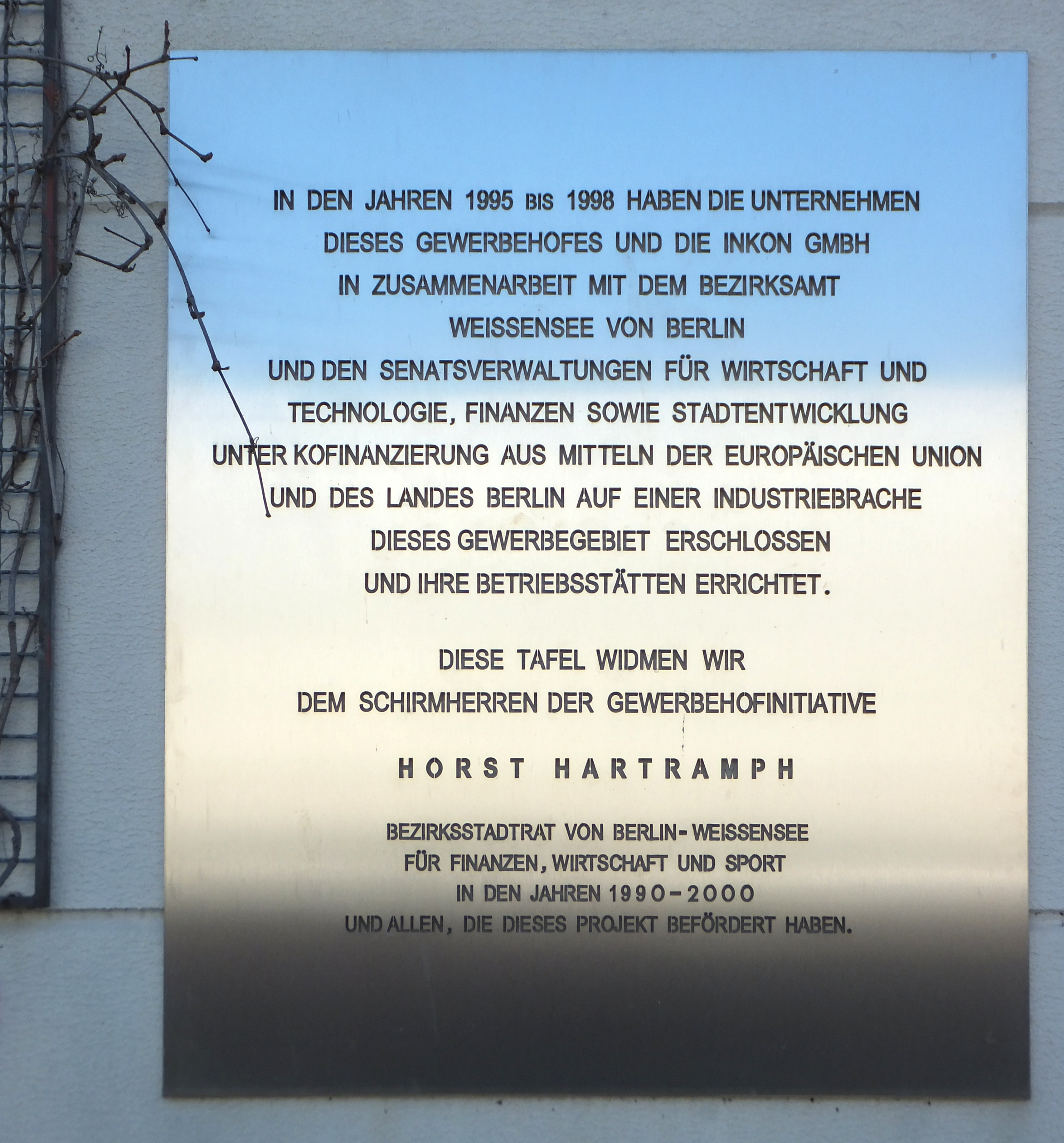 Darßer Bogen in Pankow/ Stadtrandsiedlung Malchow